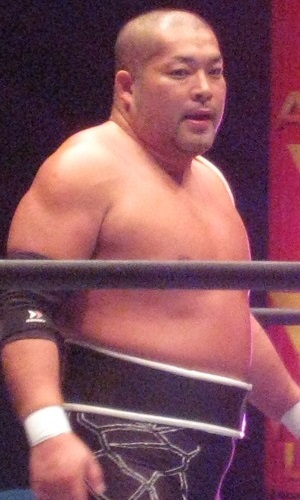 2014年9月21日 神戸ワールド記念ホール 「DESTRUCTION in KOBE」 石井智宏